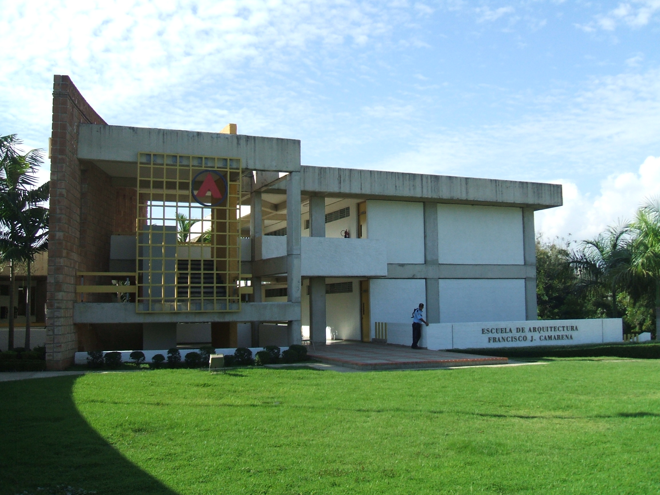 Fachada frontal de la Escuela de Arquitectura Francisco J. Camarena en la PUCMM.